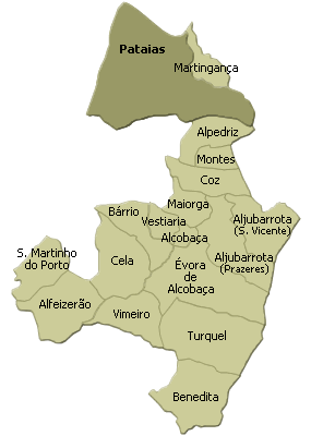 localisation de pataias sur la freguesia de alcobaça